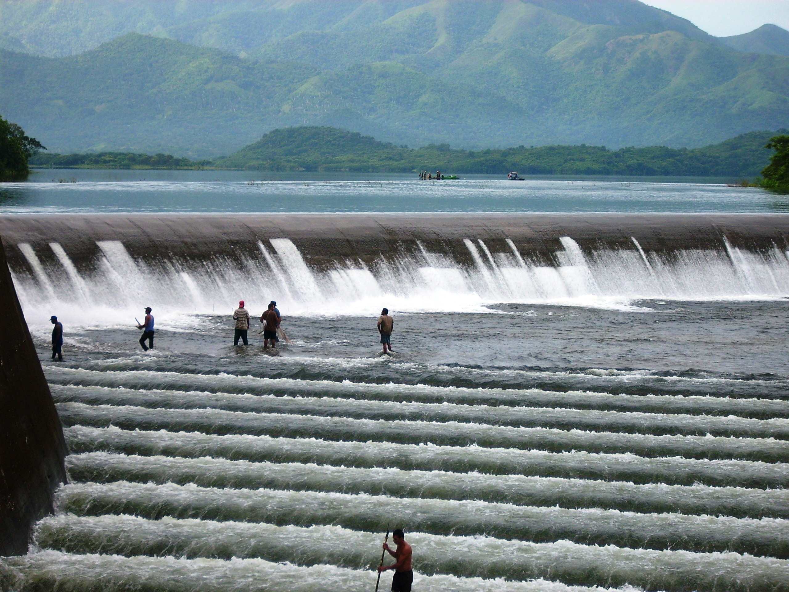 Aliviadero del embalse de Buey Arriba, con capacidad para aproximadamente 150 millones de metros cúbicos de agua. En este se almacena agua de los ríos Buey, Yao e Hicotea.